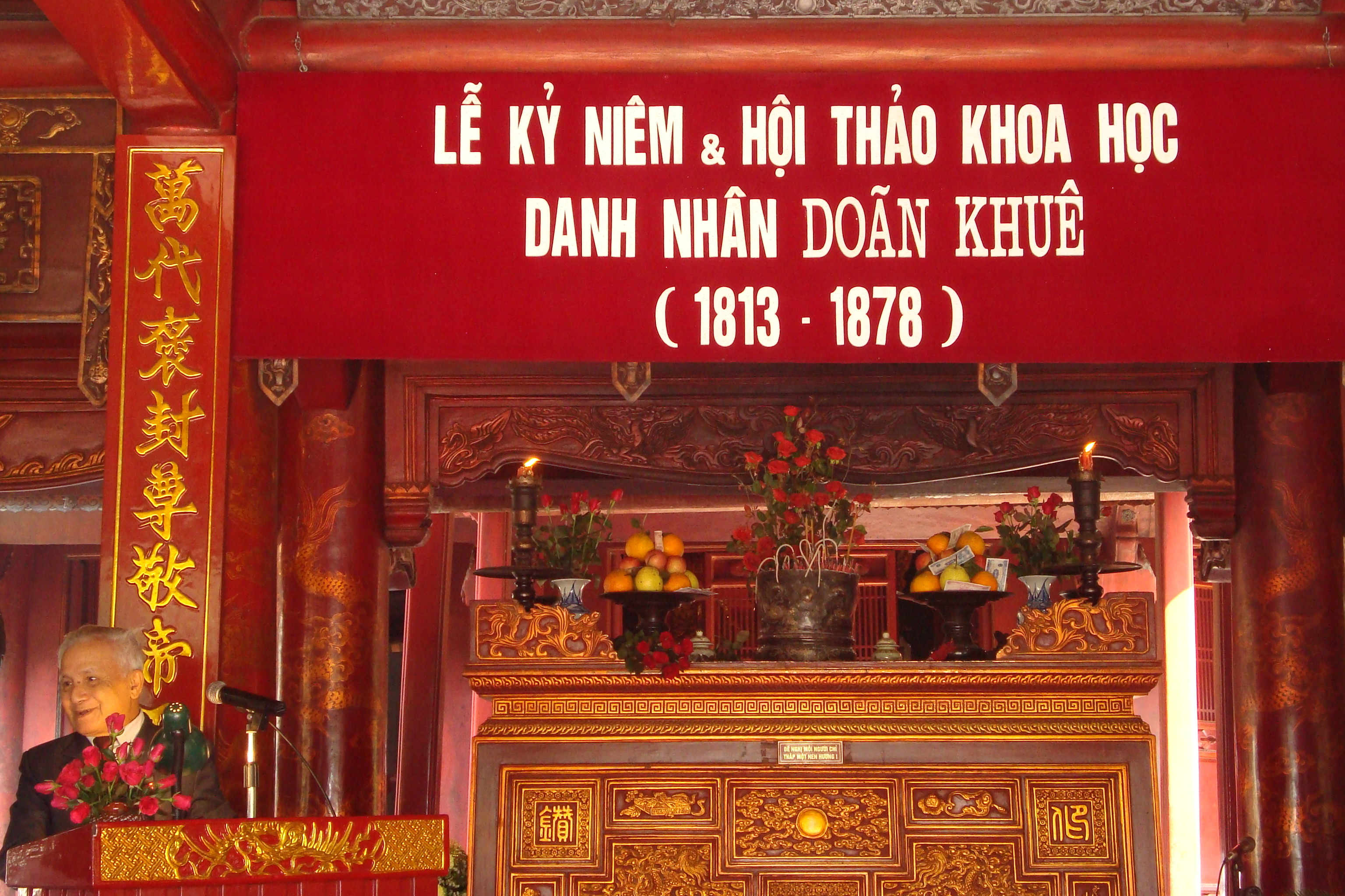 Giáo sư Vũ Ngọc Khánh phát biểu tại hội thảo khoa học kỷ niêm 195 năm sinh và 130 năm mất của Danh nhân Doãn Khuê